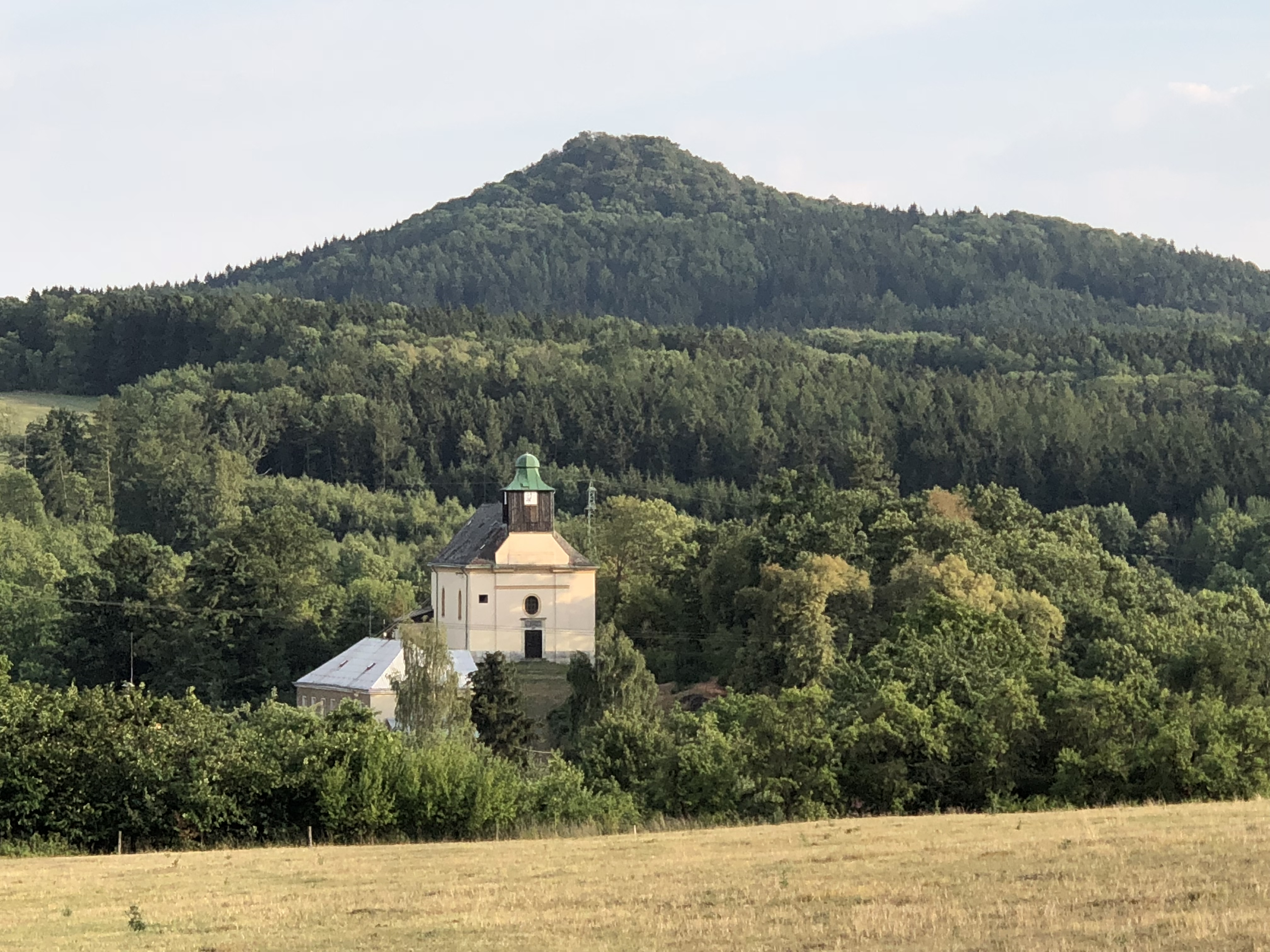 Celkový pohled na kostel sv. Pia V. na Homoli u Panny